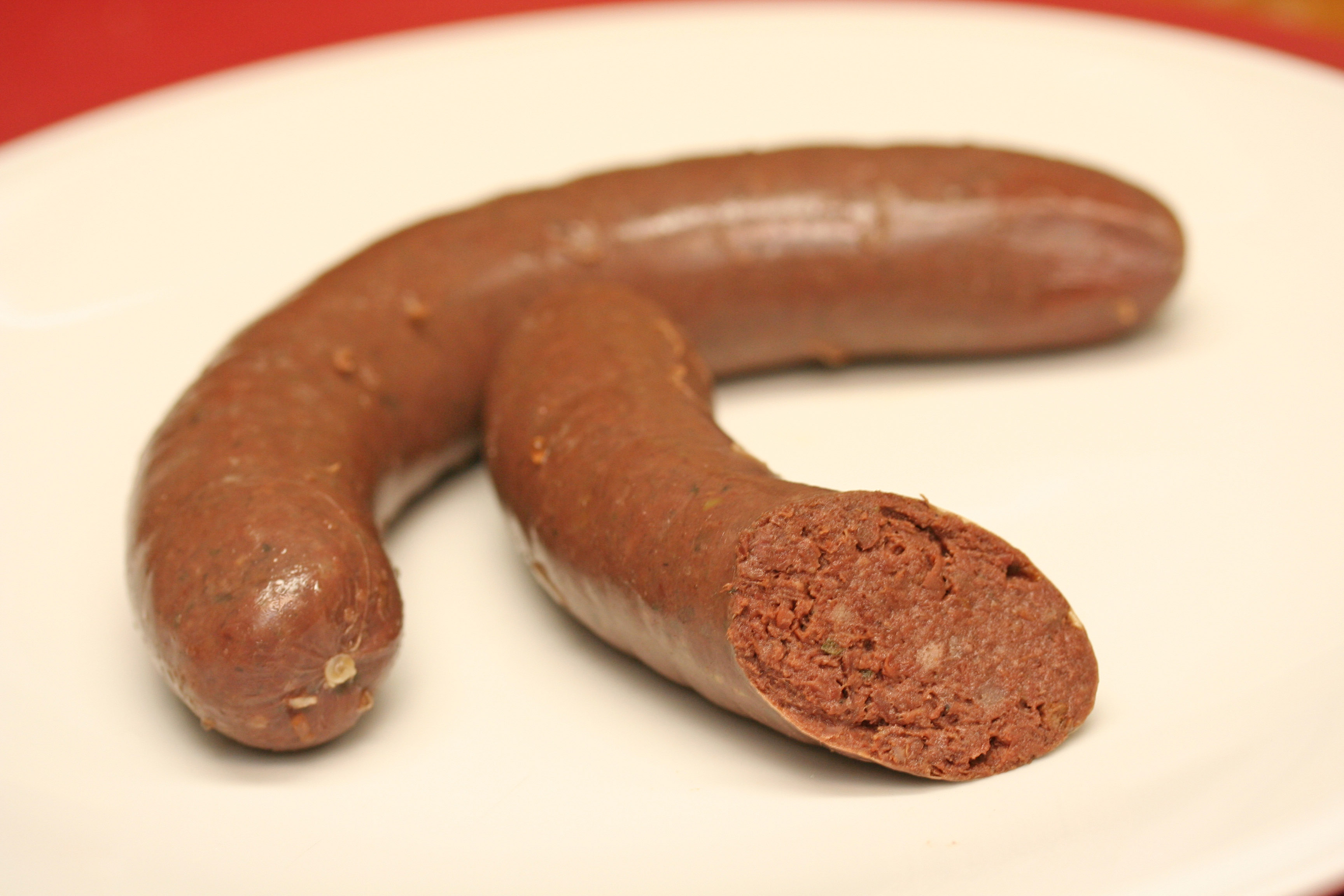 Réi Träipen.